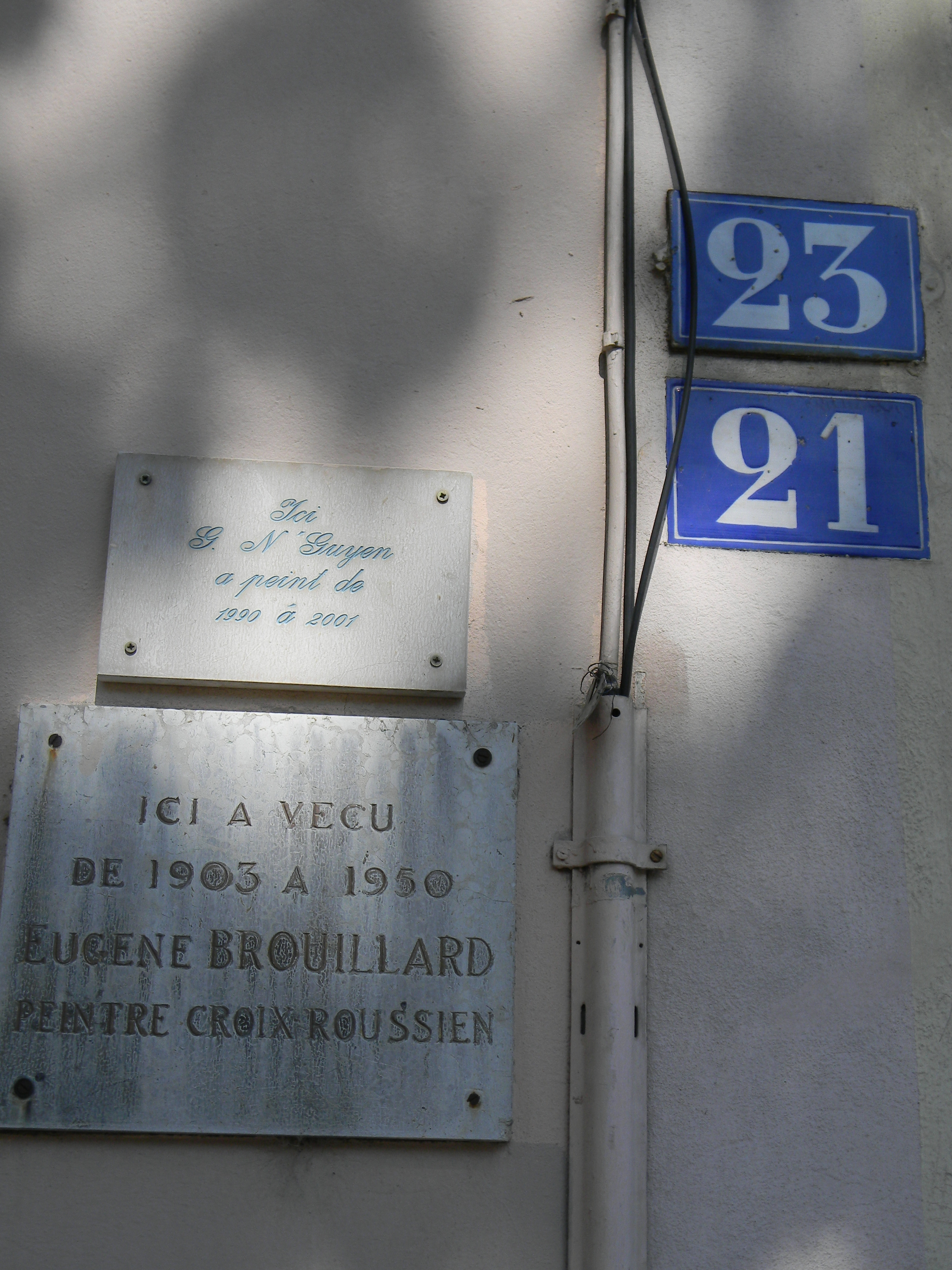 Plaque en souvenir d'Eugène Brouillard et G. N'GUYEN à la Croix-Rousse de Lyon